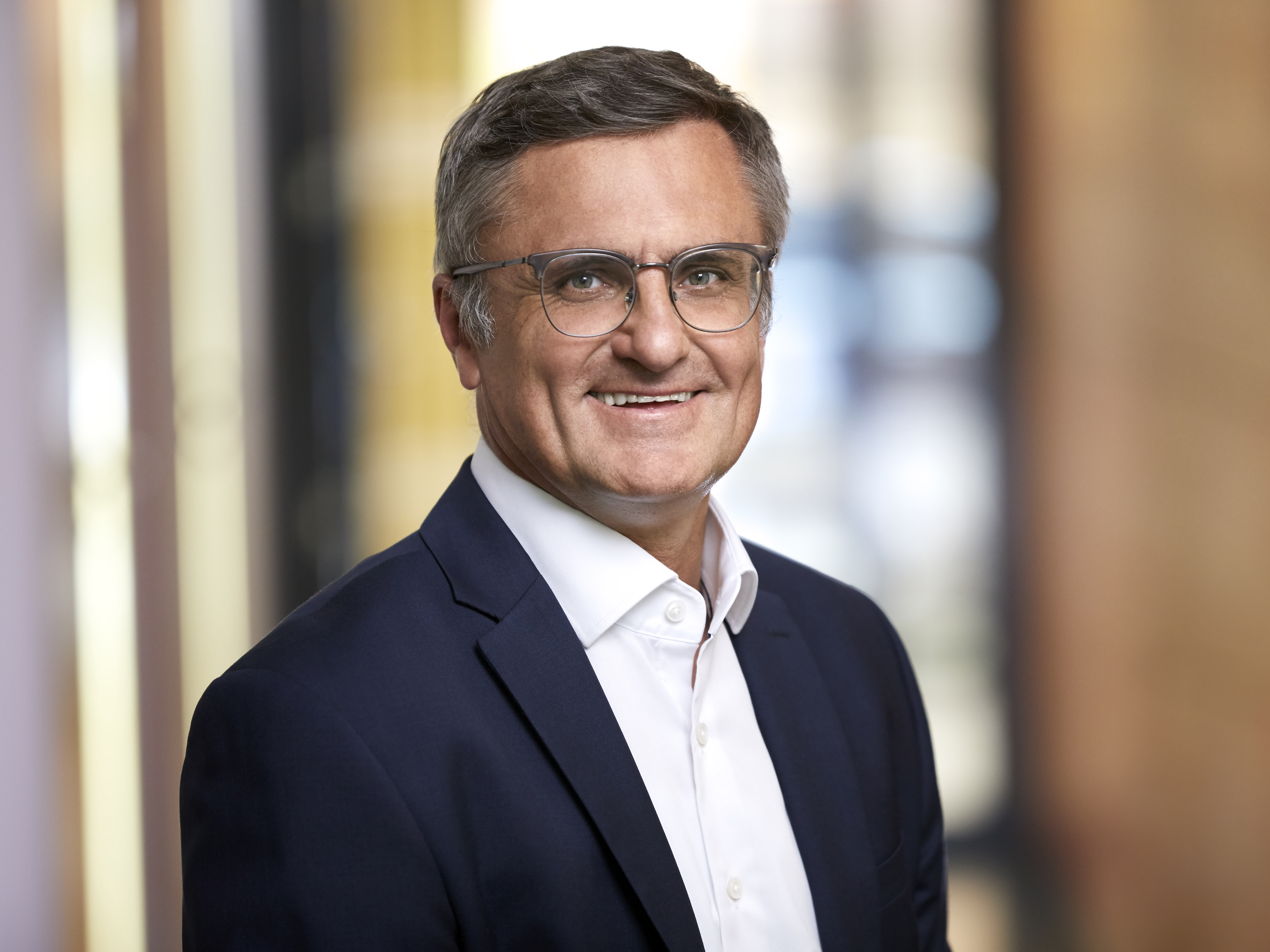 Foto: FDP-Fraktion im Bayerischen Landtag